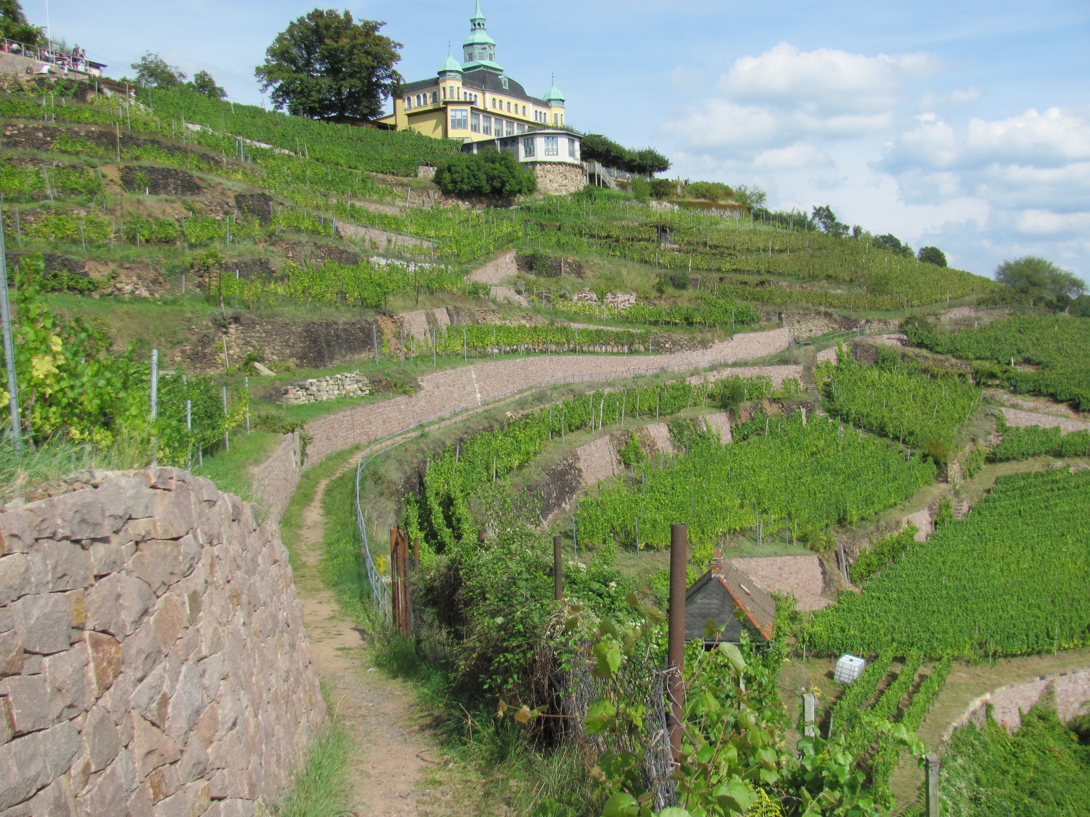 Radebeul-Oberlößnitz, Eggersweg nach Osten